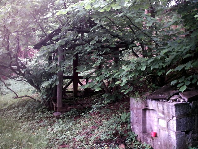 Așezarea din epoca bronzului de la Topeşti-Tismana, în punctul numit "Cetățui"